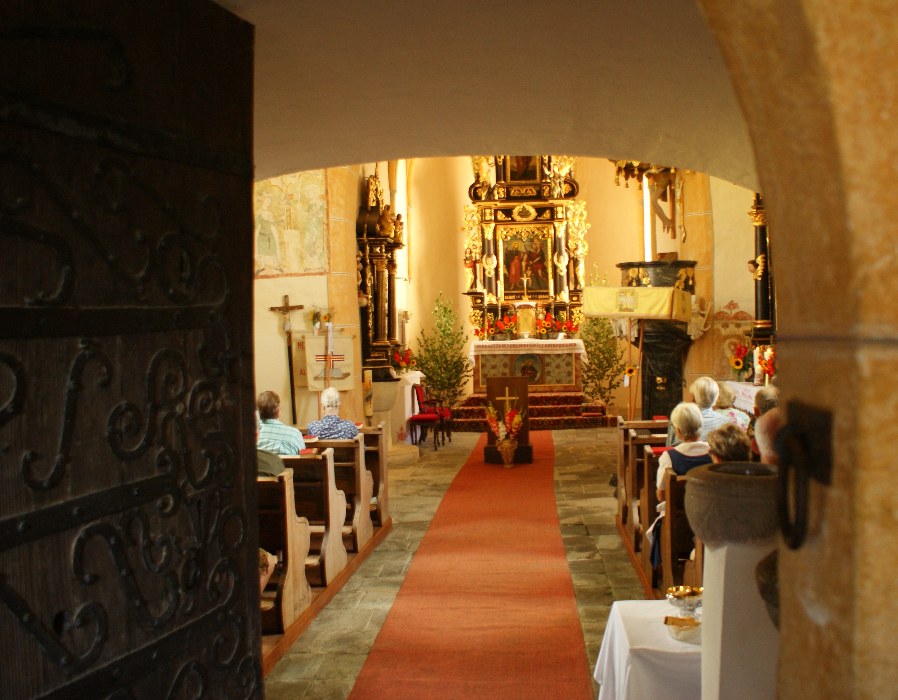 Blick auf das Innere der Kirche in Deinsberg Inder Gemeinde Guttaring (Kärnten)